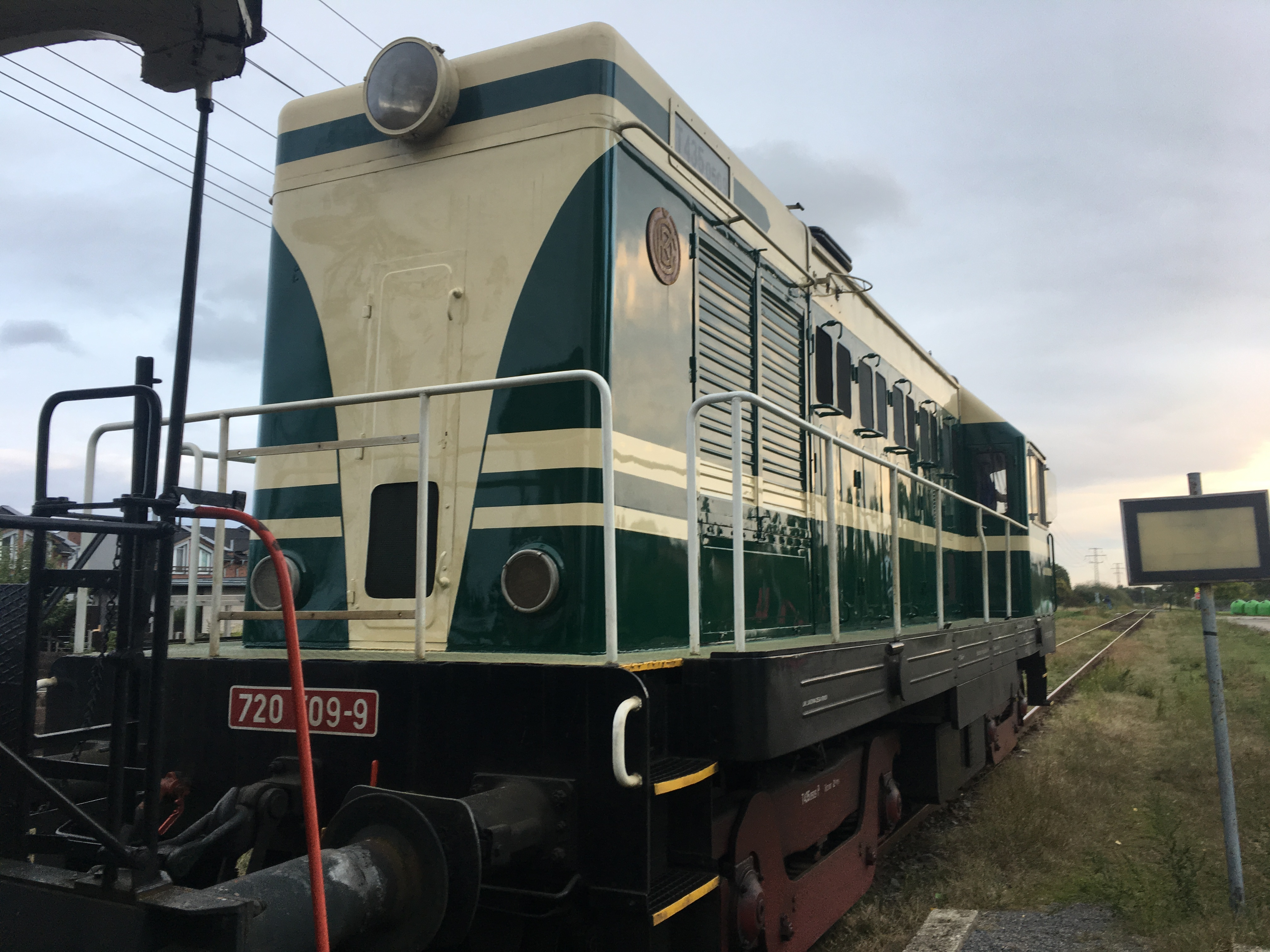 Hvozdnický expres 2018 - zelený hektor s vozem 28-29 202-6.